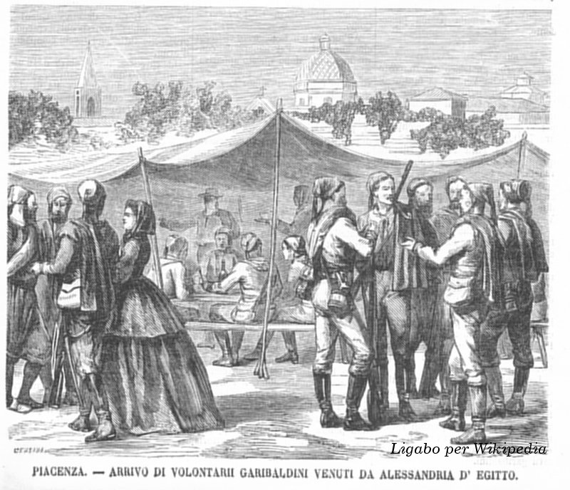 Garibaldini provenienti da Alessandria d'Egitto per arruolarsi nel Corpo Volontari Italiani e destinati alla "Brigata Alpi" (ex "Cacciatori delle Alpi"), di stanza a Piacenza, nel 1866.